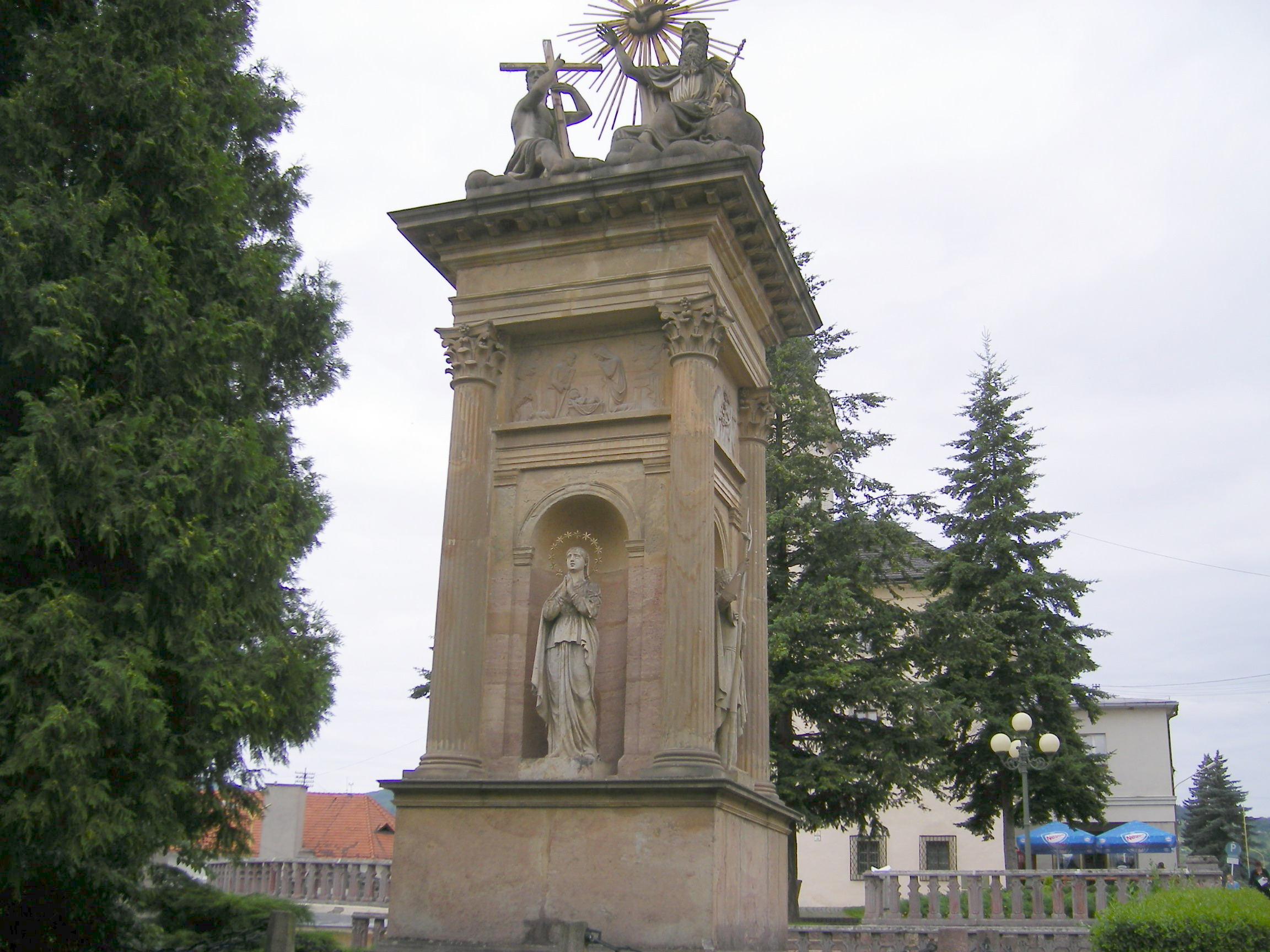 Nová Baňa (ZC), socha Svätej Trojice